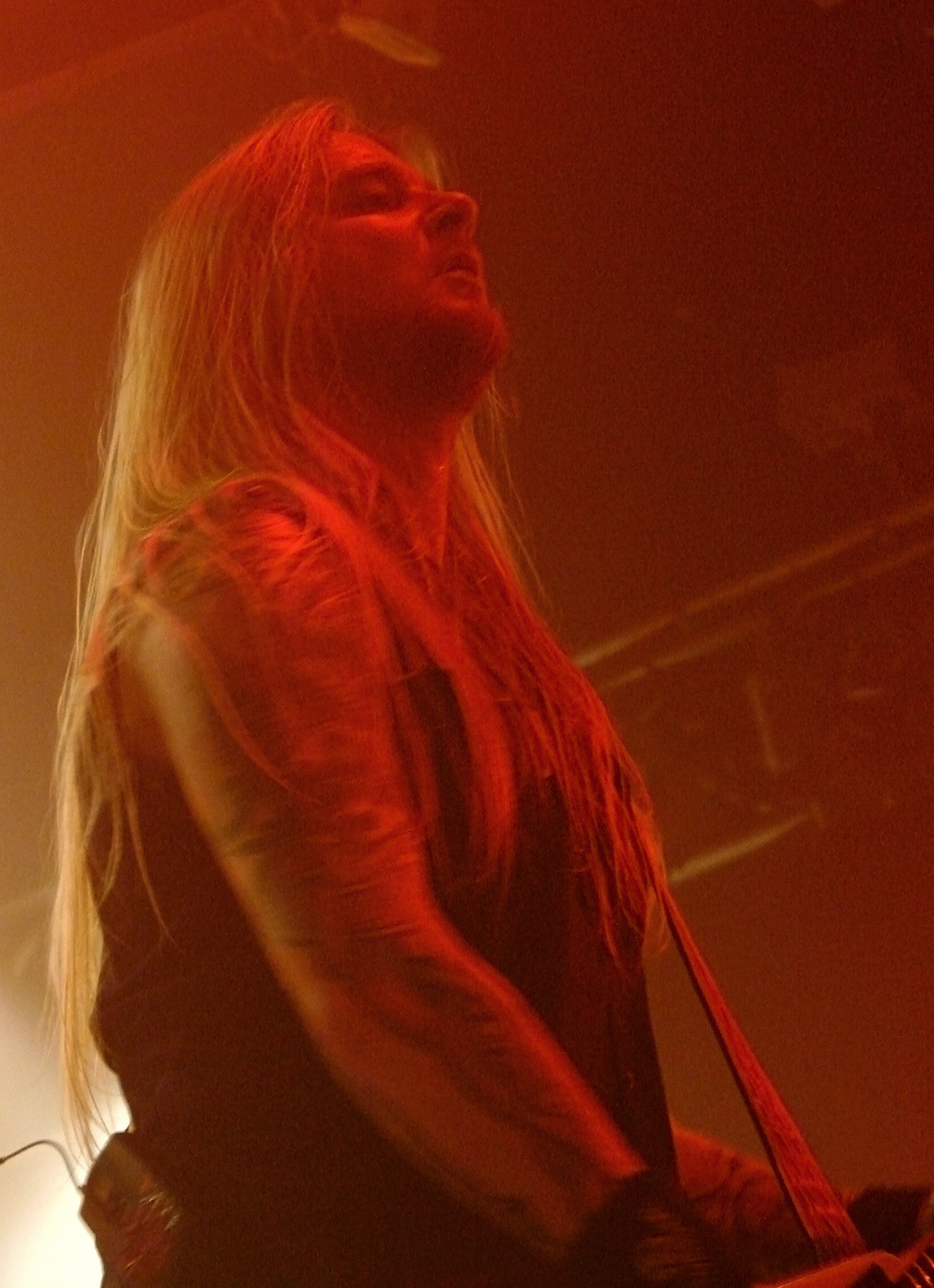 Soilwork en concert à Paris, à la Locomotive, le 12/10/07.